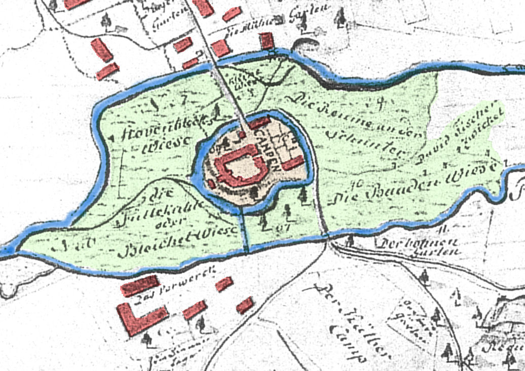 Burg Campen, nachkoloriert